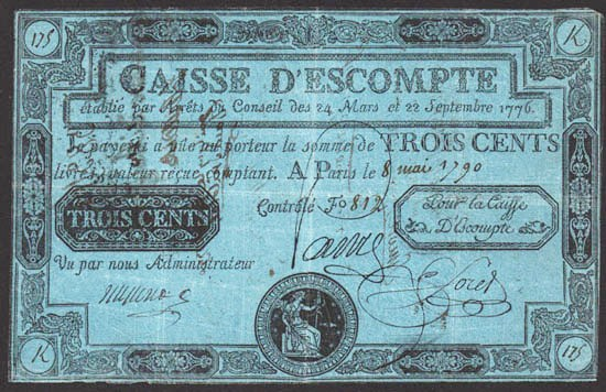 Obligation de la Caisse d'escompte pour un montant de 300 livres émise le 8 mai 1790 à Paris. THIS WAS NOT A BANKNOTE